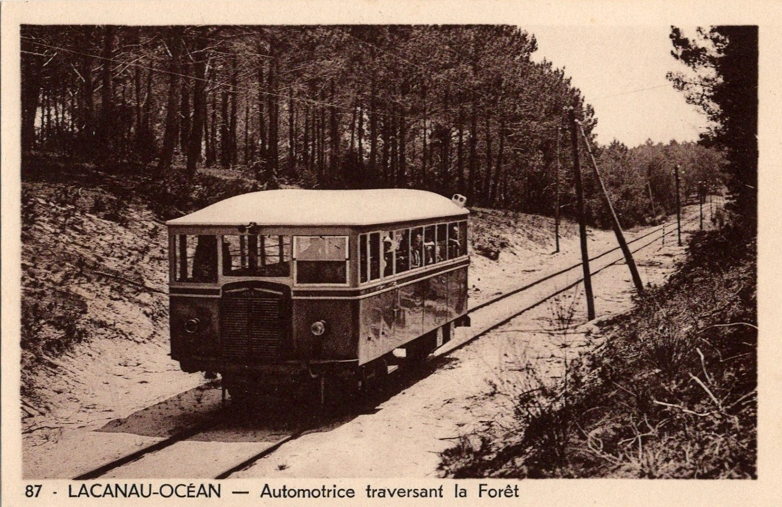 Lacanau